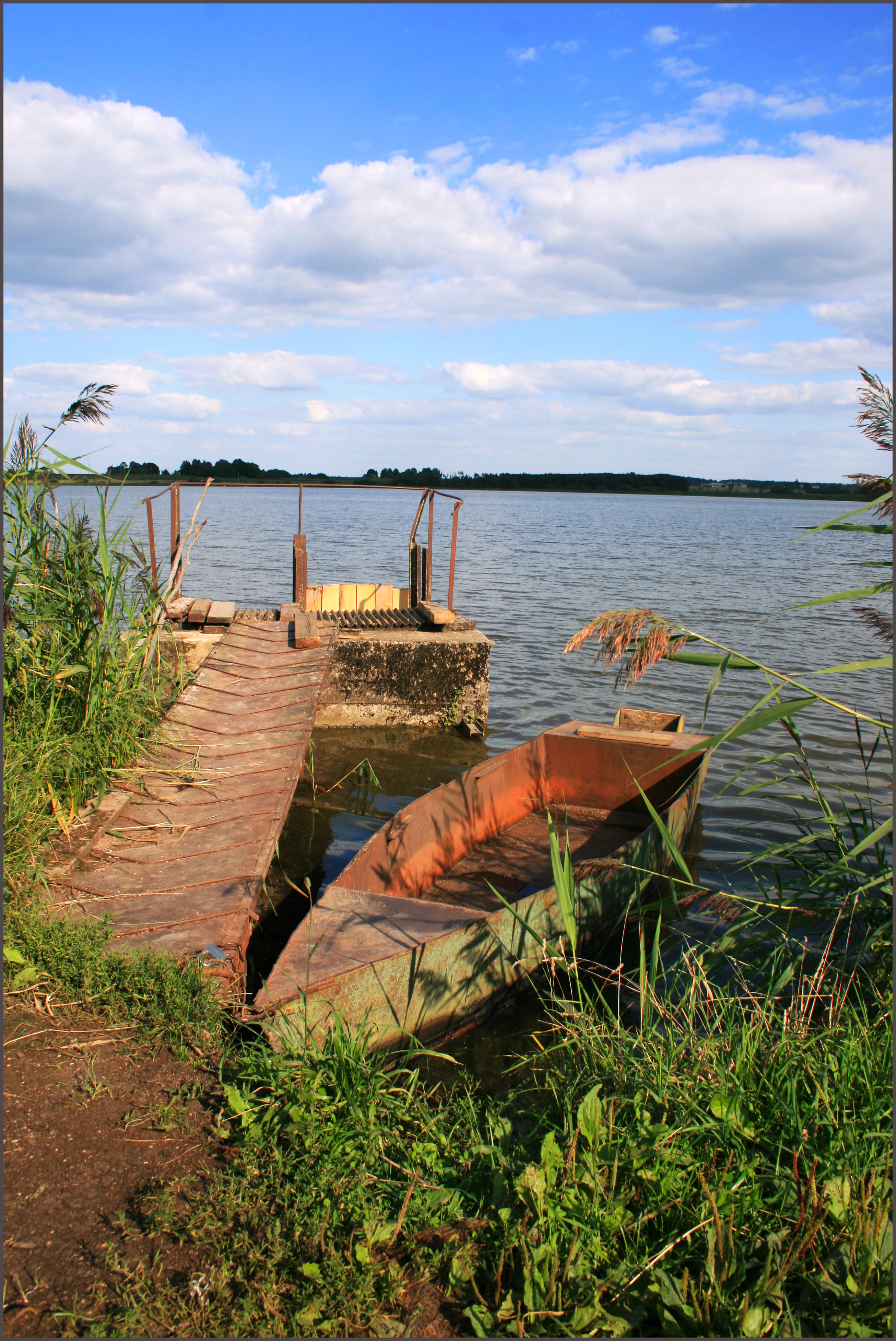 Silzemju pond